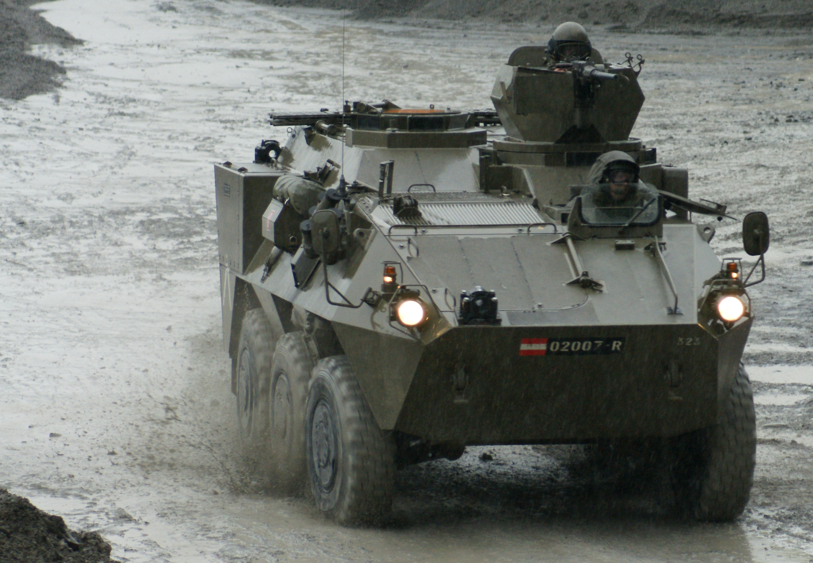 Im Zuge einer Road-Show zeigte das Österreichische Bundesheer im Dornbirner / Hohenemser Steinbruch den Radpanzer Pandur . Kurzbezeichnung: MTPz (Mannschaftstransportpanzer) "Pandur", Gewicht: 13,5 t, Motorleistung: 191 kW (250 PS), Höchstgeschwindigkeit: 100 km/h, Steigfähigkeit: 70 %, Besatzung: 9 Mann, Bewaffnung: 12,7 mm üsMG M2.